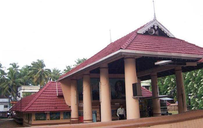 കോട്ടപ്പുറം മഹാദേവക്ഷേത്രം